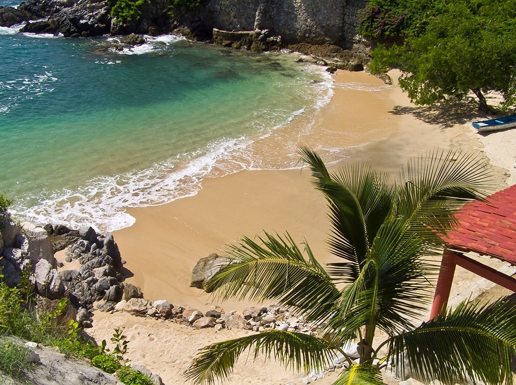 Playa de Estacahuite